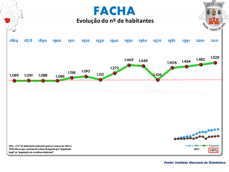 Censos 1864/2011